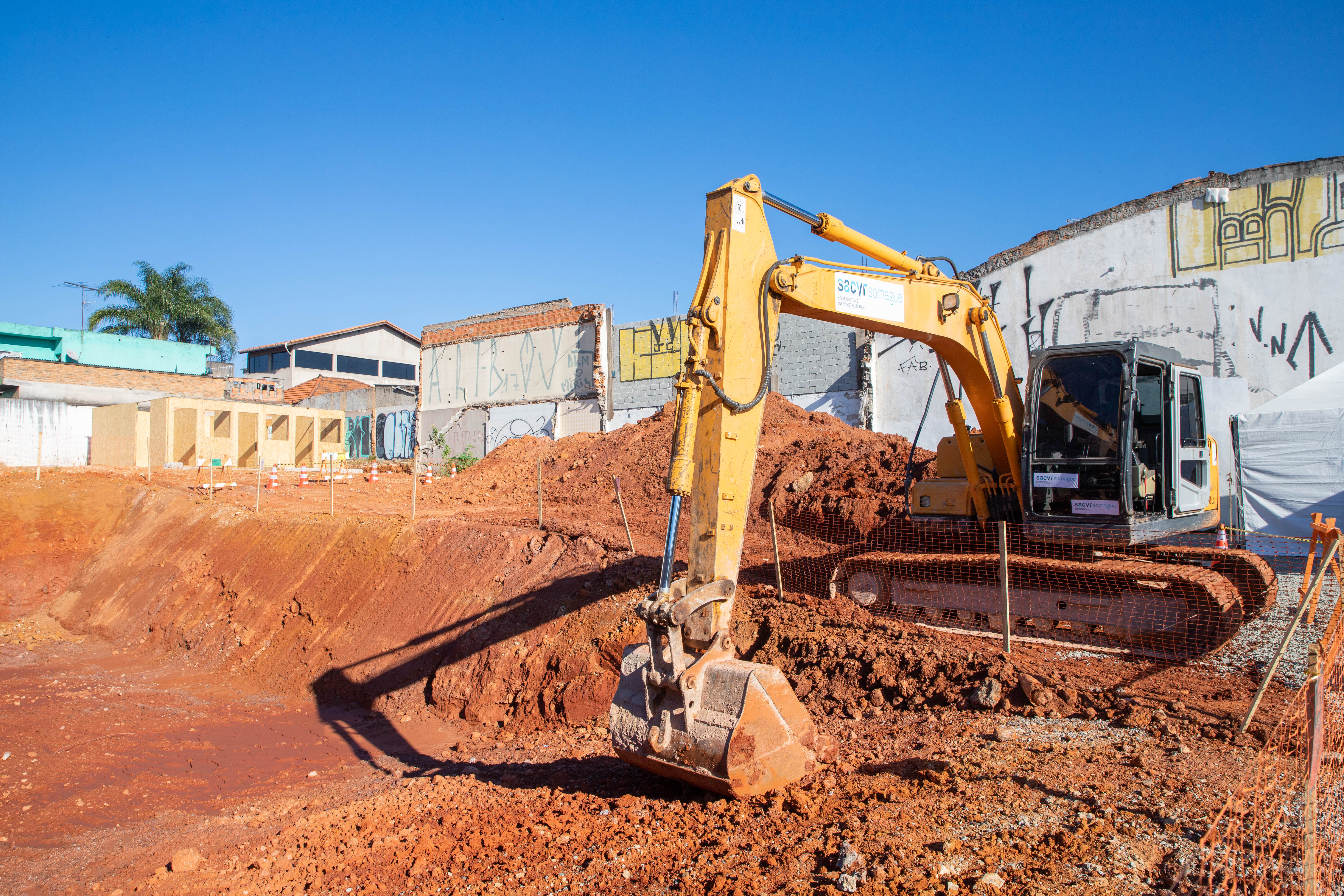 O governador do Estado de São Paulo, João Doria participa do Início de obras da nova estação Jardim Colonial, linha 15 - Prata de Metrô. Data: 27/05/2019. Local: São Paulo. Foto: Governo do Estado de São Paulo